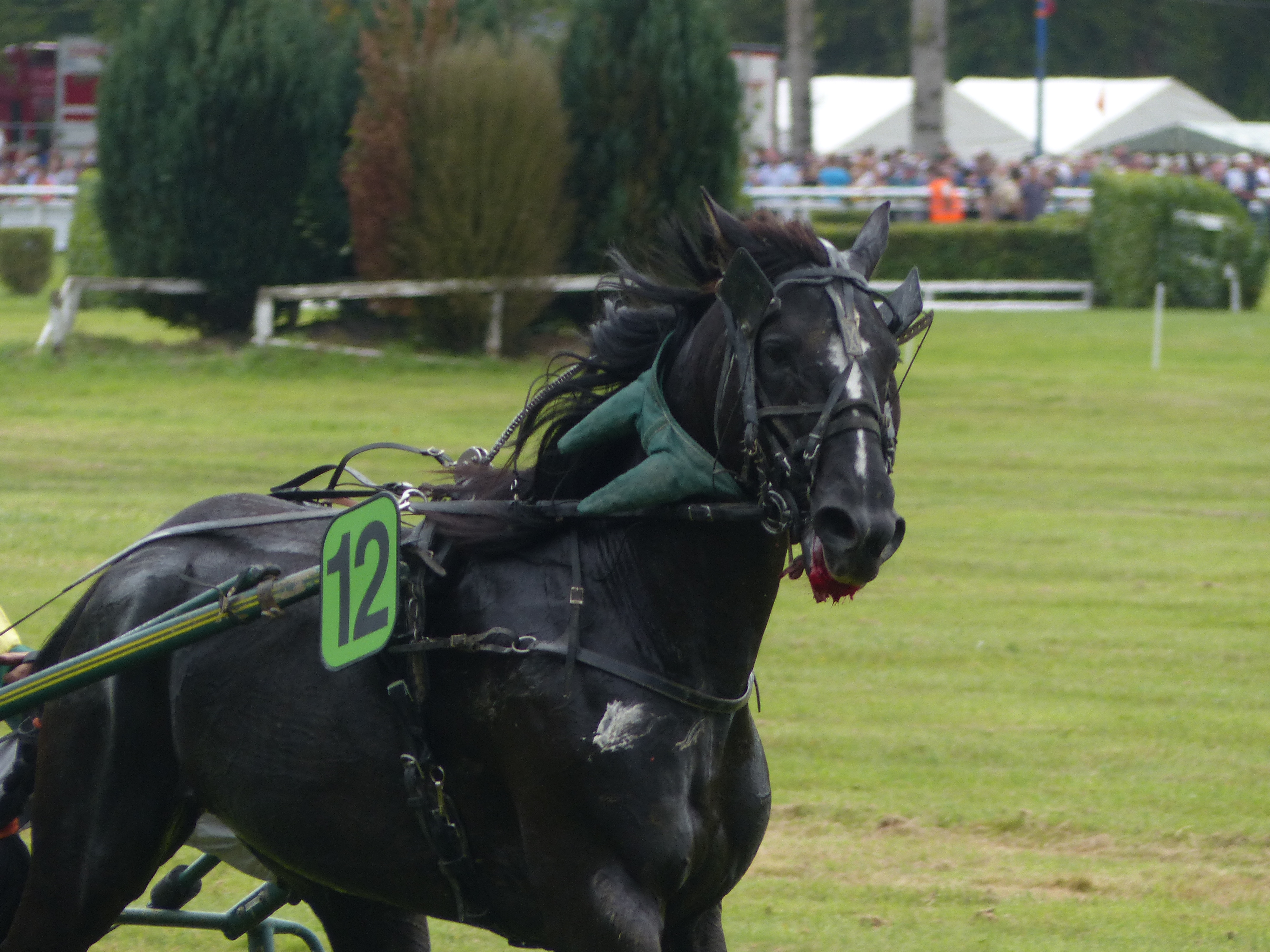 Hémorragie pulmonaire induite par l’exercice chez un cheval trotteur français noir, avec épistaxis bilatérale (saignement des naseaux et de la bouche)